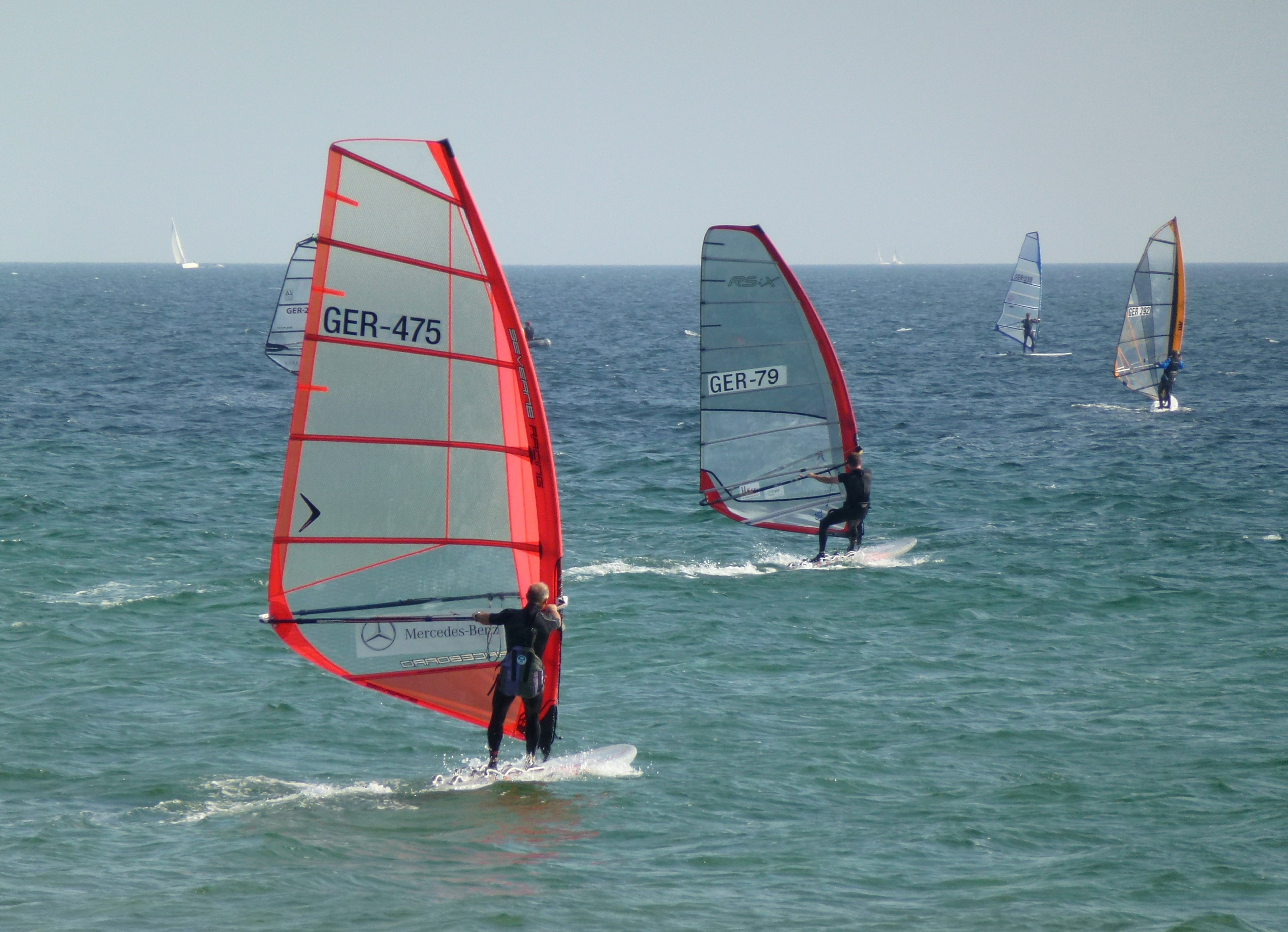 Grossenbrode strand